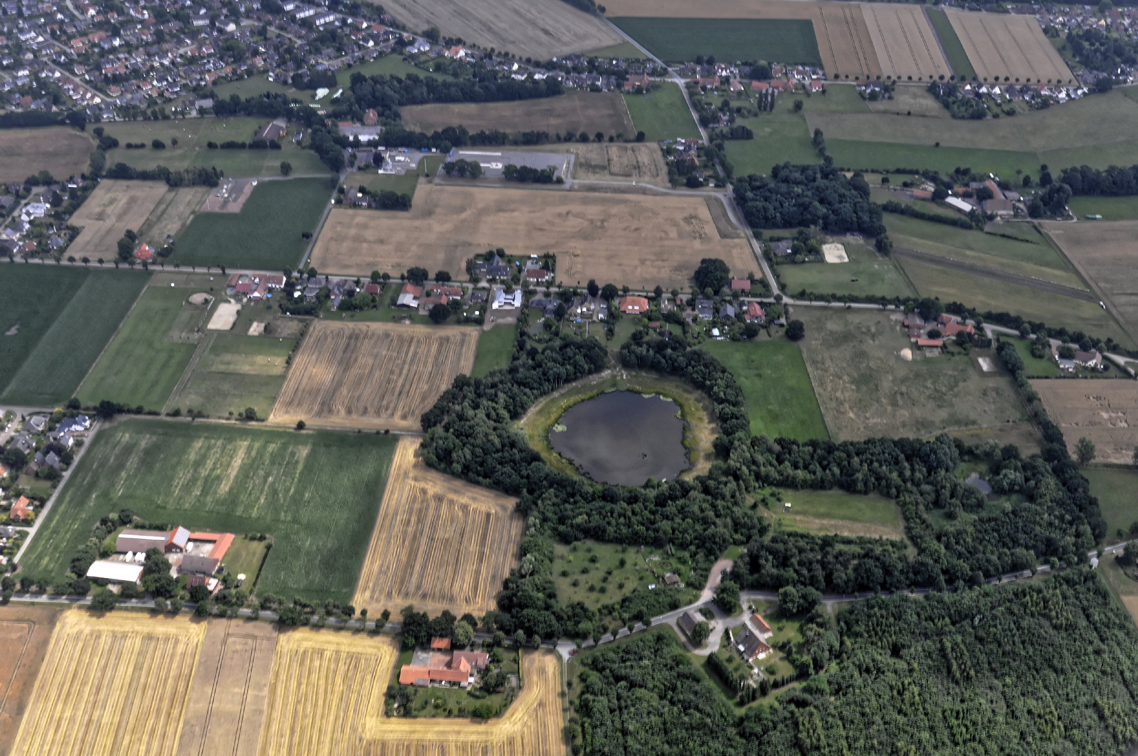 Bilder vom Flug Nordholz-Hammelburg 2015: Blick von Westen auf das runde Schlatt genannt „Großes Moor“, „Böttchers Moor“, „Esdohrs Moor“, oder „Leester Moor“ bei Weyhe.